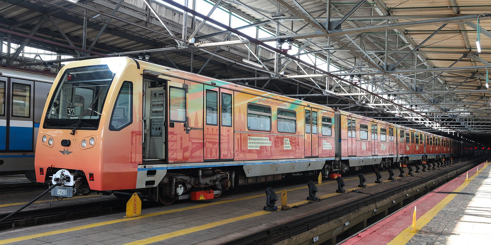 Поезд в депо